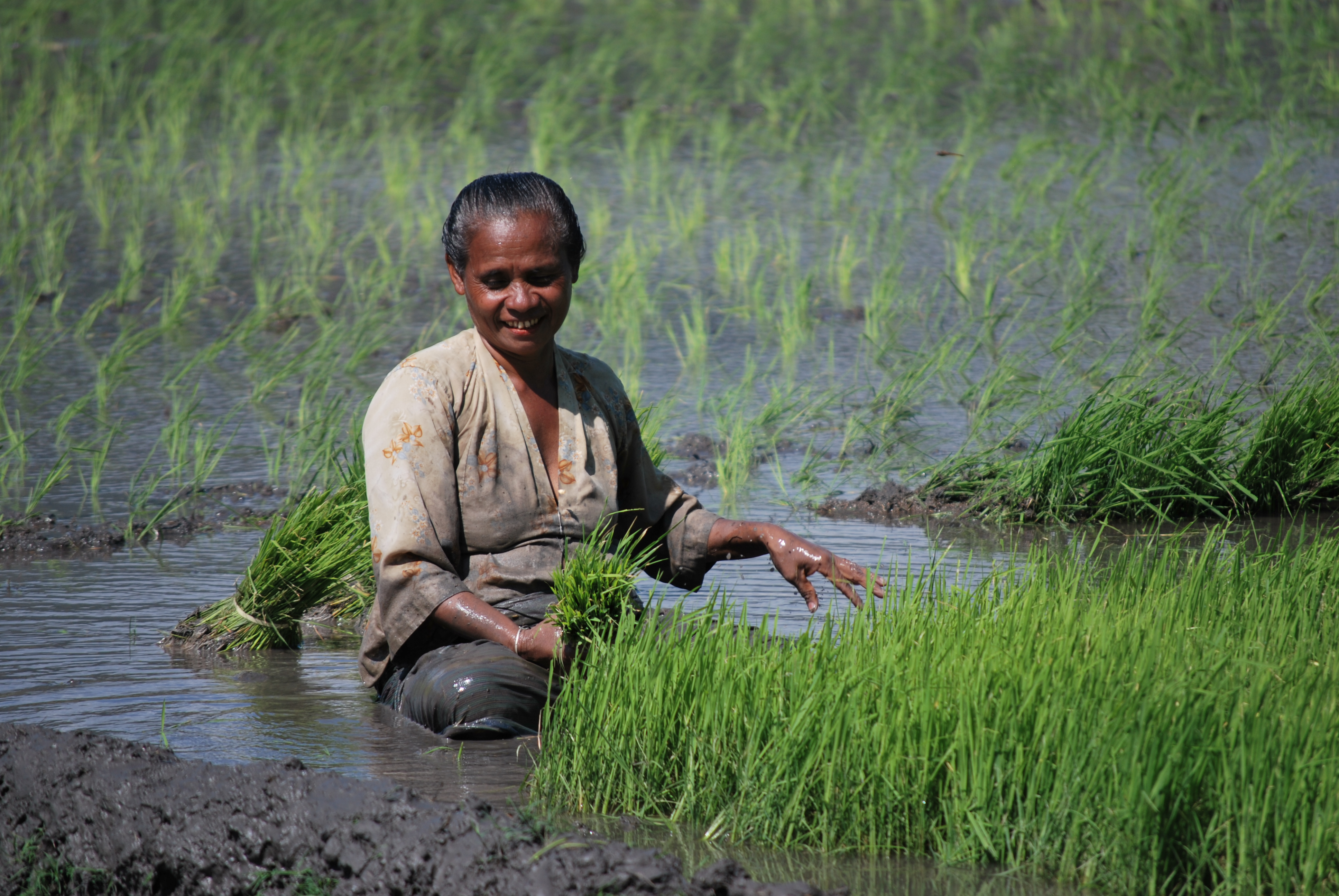 Reisfelder in Oemelo, Lifau, Oecusse